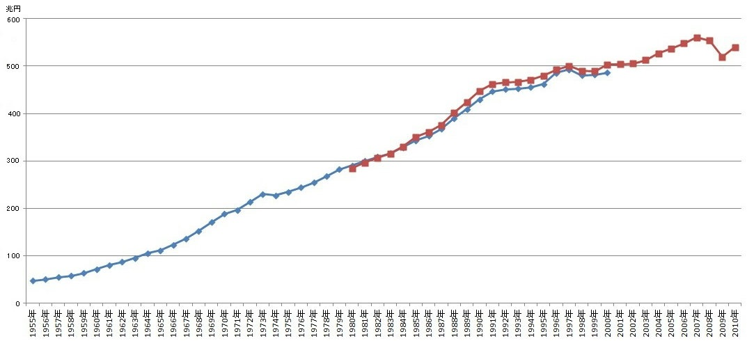 このグラフは、日本の実質GDPの推移を表したものである。青い線が1990年基準によるグラフで、赤い線が2000年基準によるグラフとなっている。